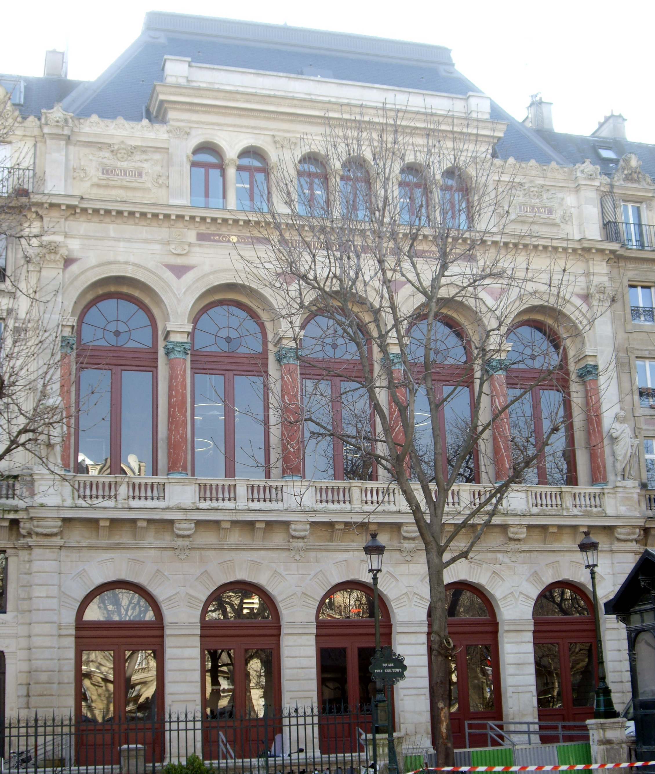 Théâtre de la Gaîté, 3 bis rue Papin, Paris 3e. Vu depuis le square Émile-Chautemps.